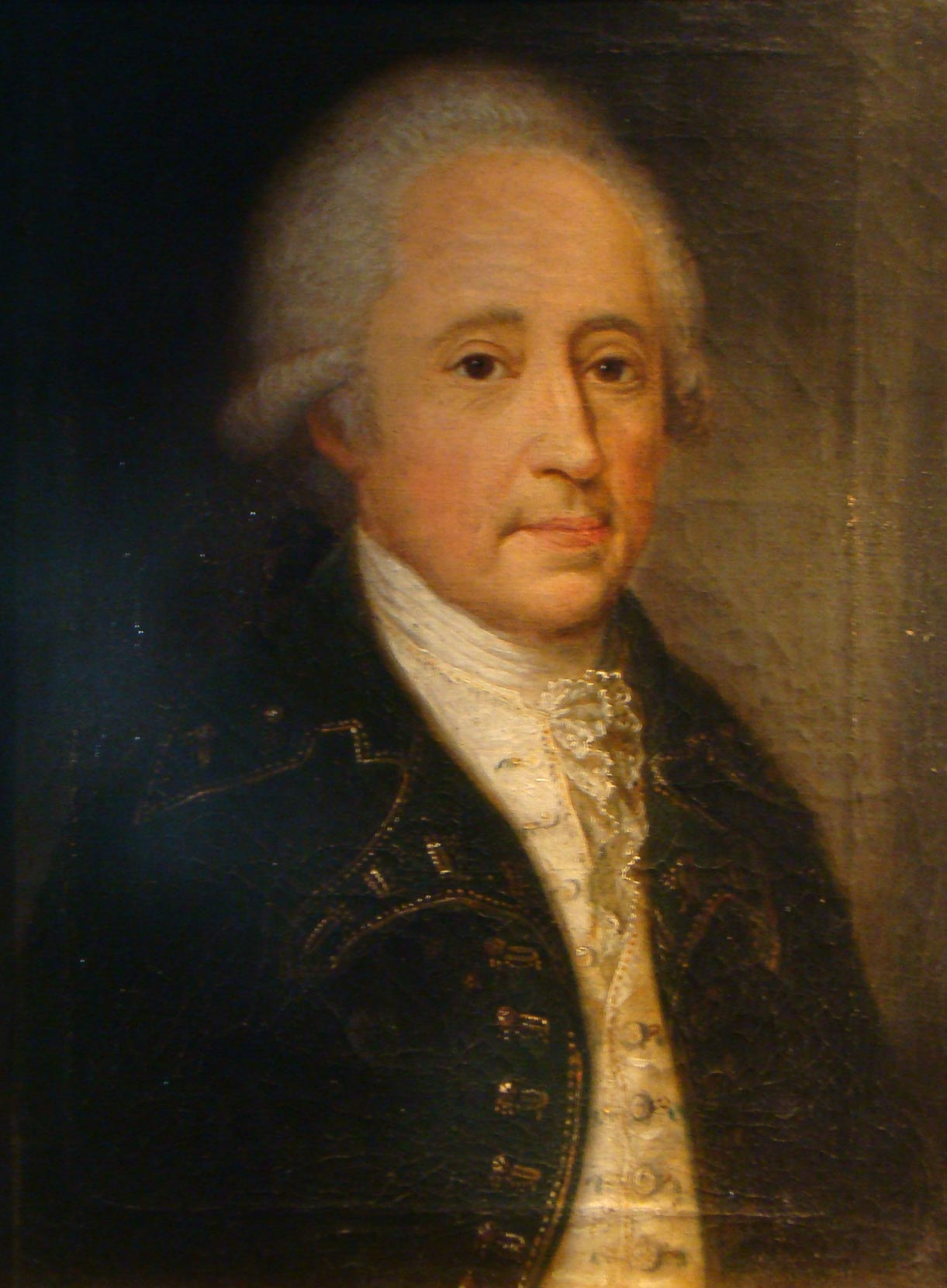 Ölporträt des Heilbronner Bürgermeisters Georg Heinrich von Roßkampff im Haus der Stadtgeschichte Heilbronn